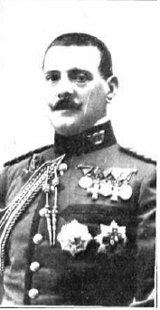 Fotografía del coronel Martínez Anido publicada en febrero de 1912 con motivo de ser director de la Academia de Infantería de Toledo.